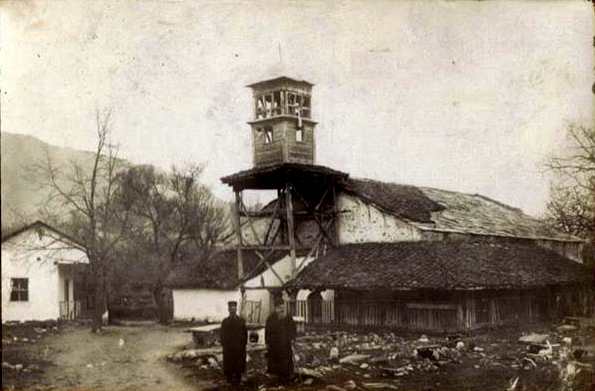 Црквата „Св. Атанасиј“ во Богомила во 1929 година